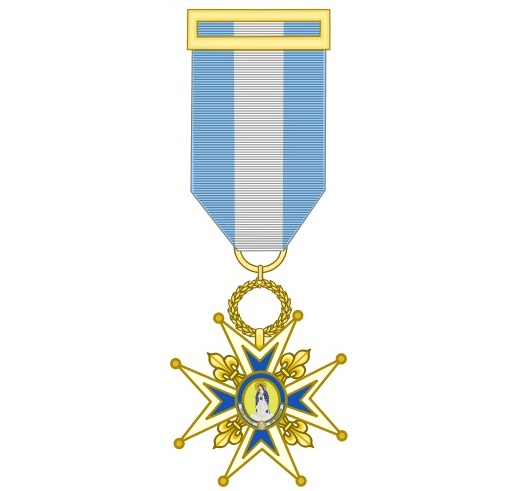 Cruz de la Orden de Carlos III.